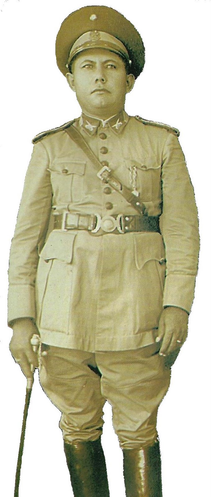 O então Tenente João Bezerra, comandante da força volante que atacou a Grota do Angico, em 28/07/1938, exterminando Lampião e seu bando.